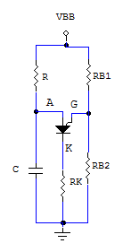 descripcion de la conexion del put